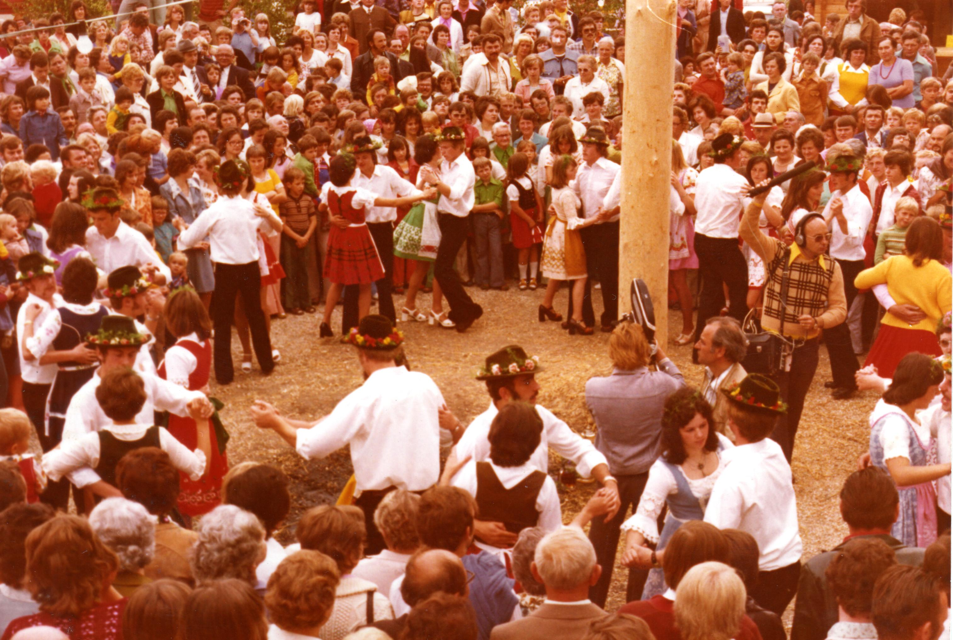 Kirwa Raigering 1975 mit Bayerischem Rundfunk